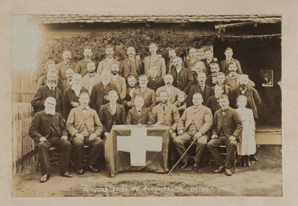 Sociedad Suiza de Beneficencia de Victoria Chile, unos años después de la llegada de los Colonos Suizos (1883-1889).